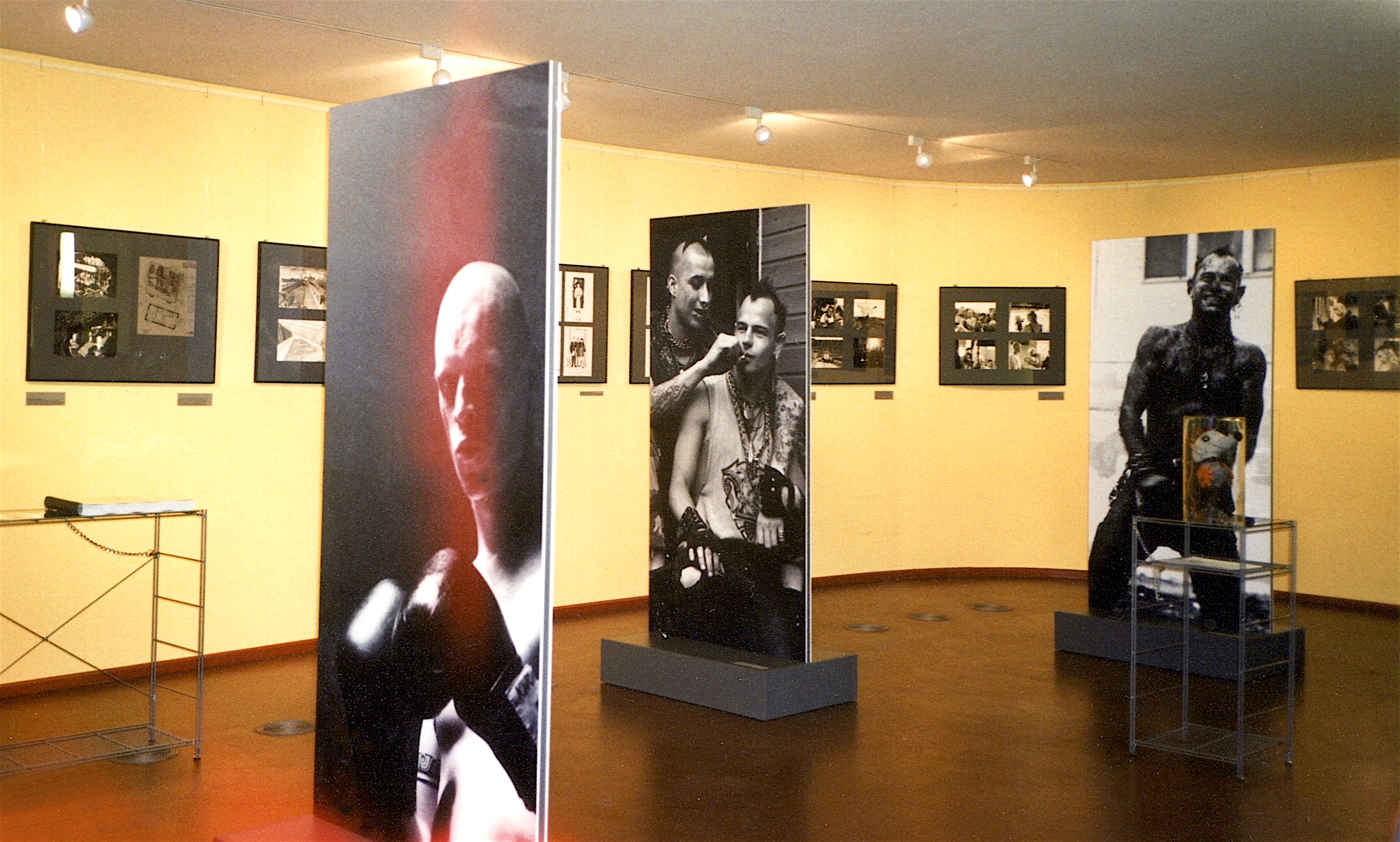 Ausstellung zum Kinofilm "Oi! Warning" im Kino Babylon, Berlin, 2002